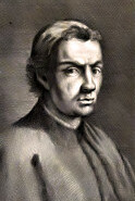 Burchiello alias Domenico di Giovanni (1404-1449), Italian poet